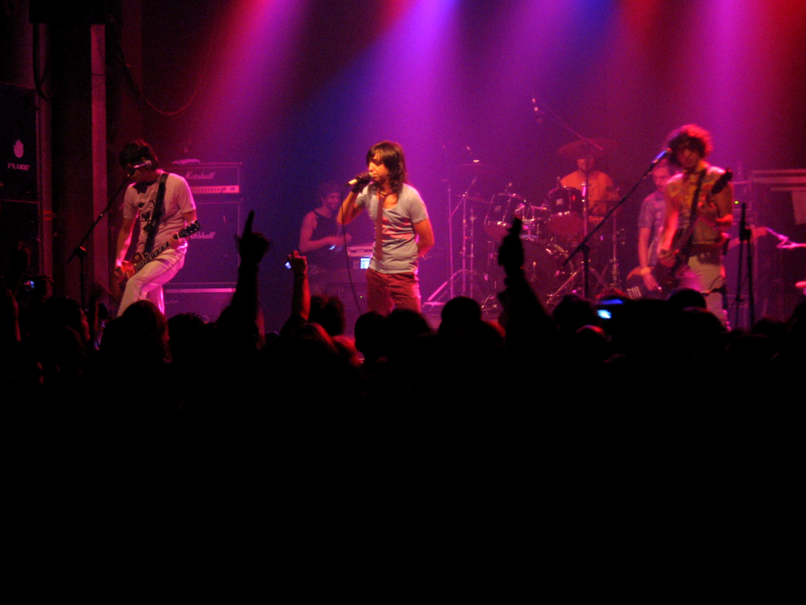 Presentación de Babasónicos en Madrid.